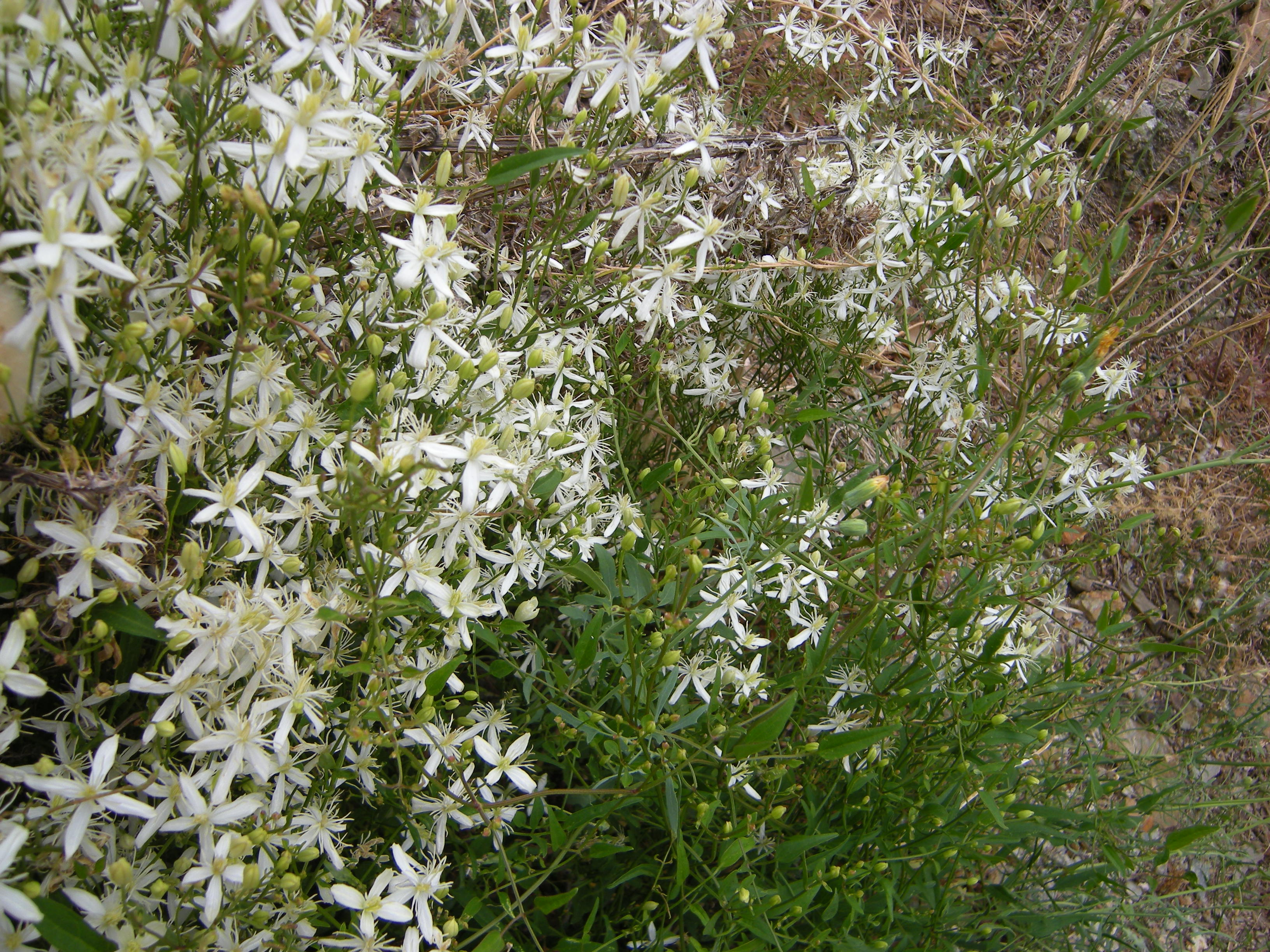 fleurs blanches inconnues prises a banyuls, terrain cailloteux shiste